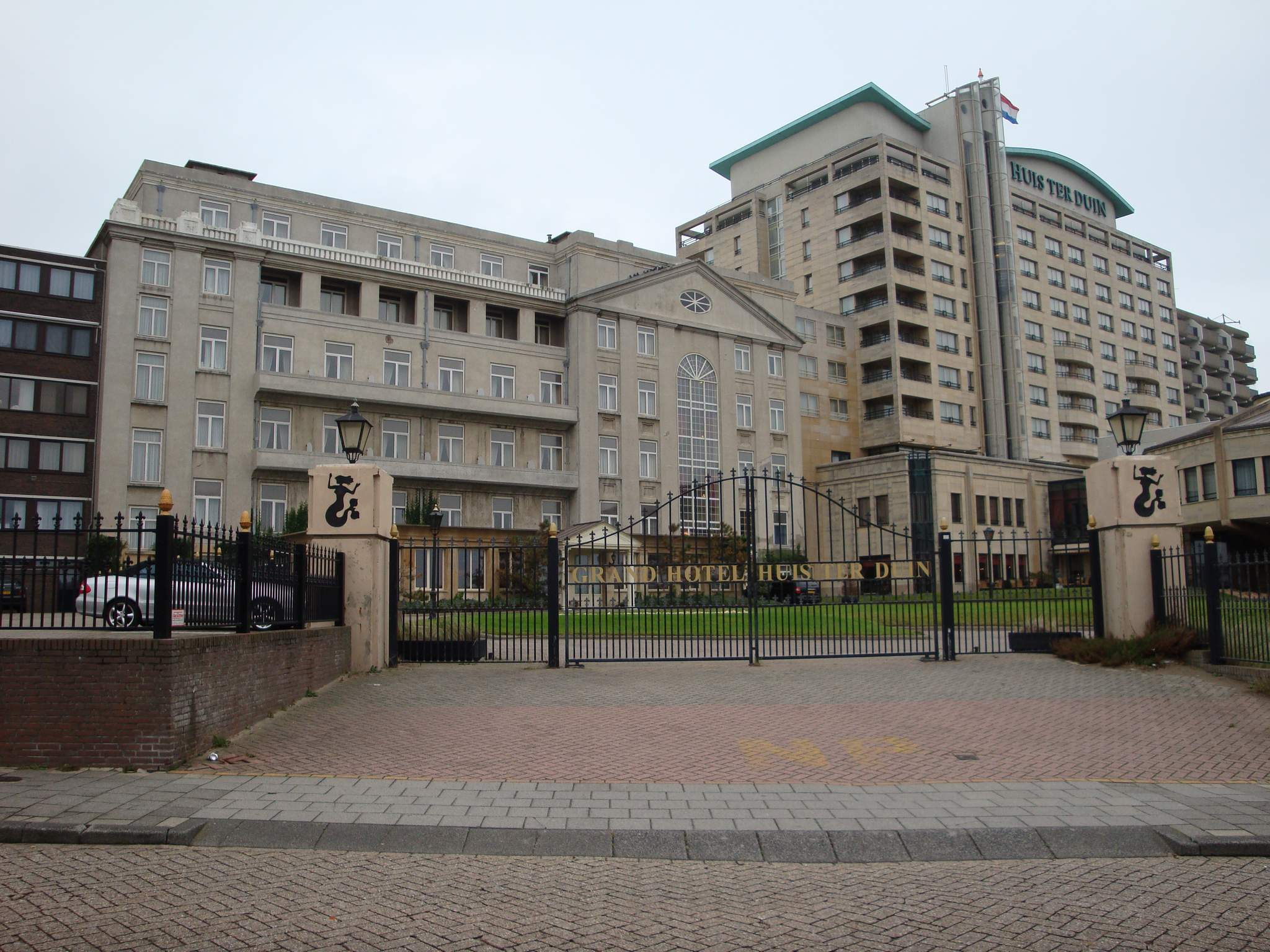 Hotel Huis ter Duin, Noordwijk, oktober 2008